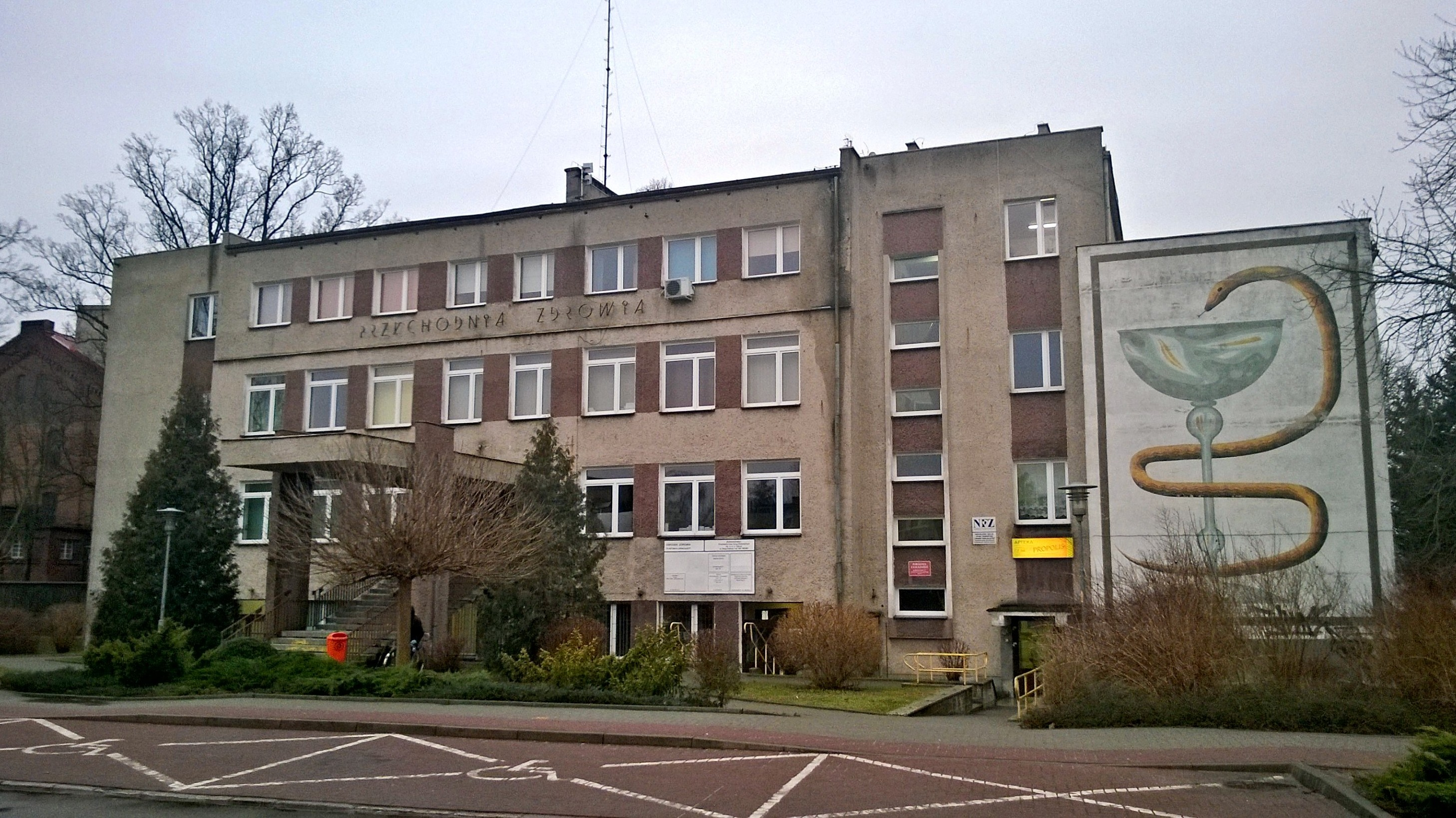 Dębno